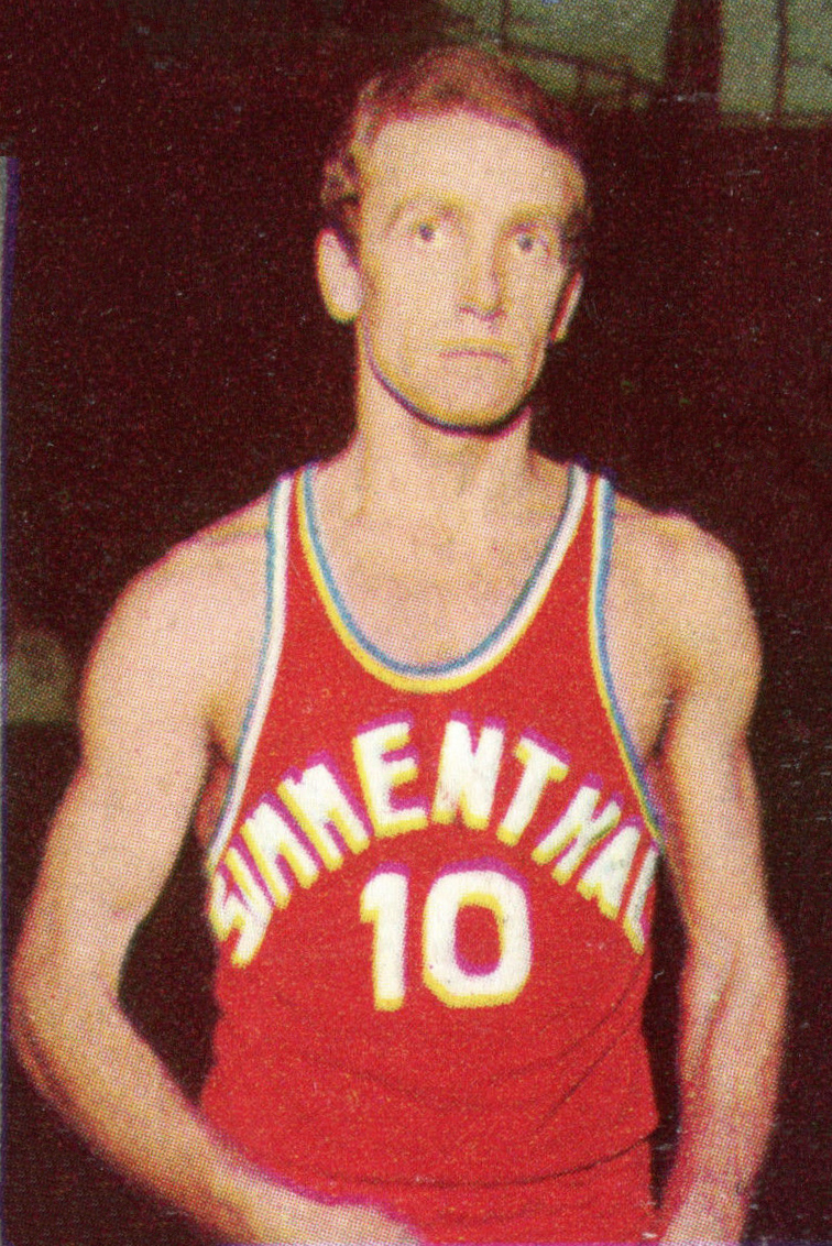 Il cestista Sandro Riminucci Figurina Campioni dello sport Panini 1967